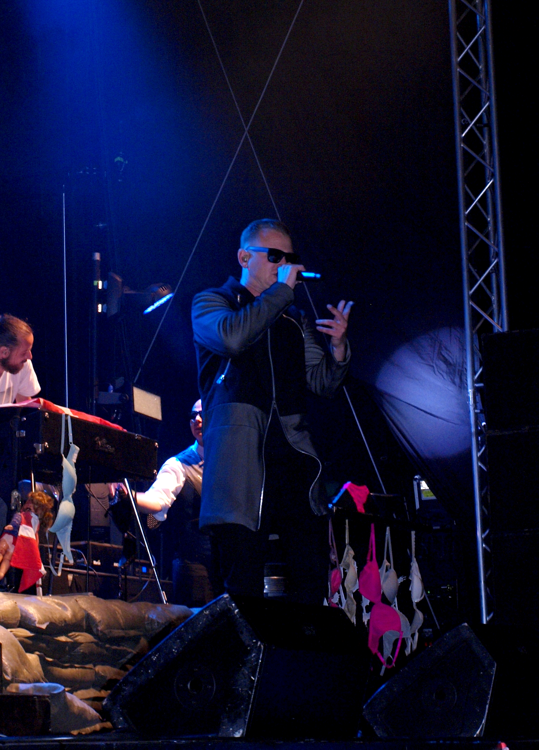 Bai-D under Suspekt koncert ved Studierock i Kolding, 4. september 2015